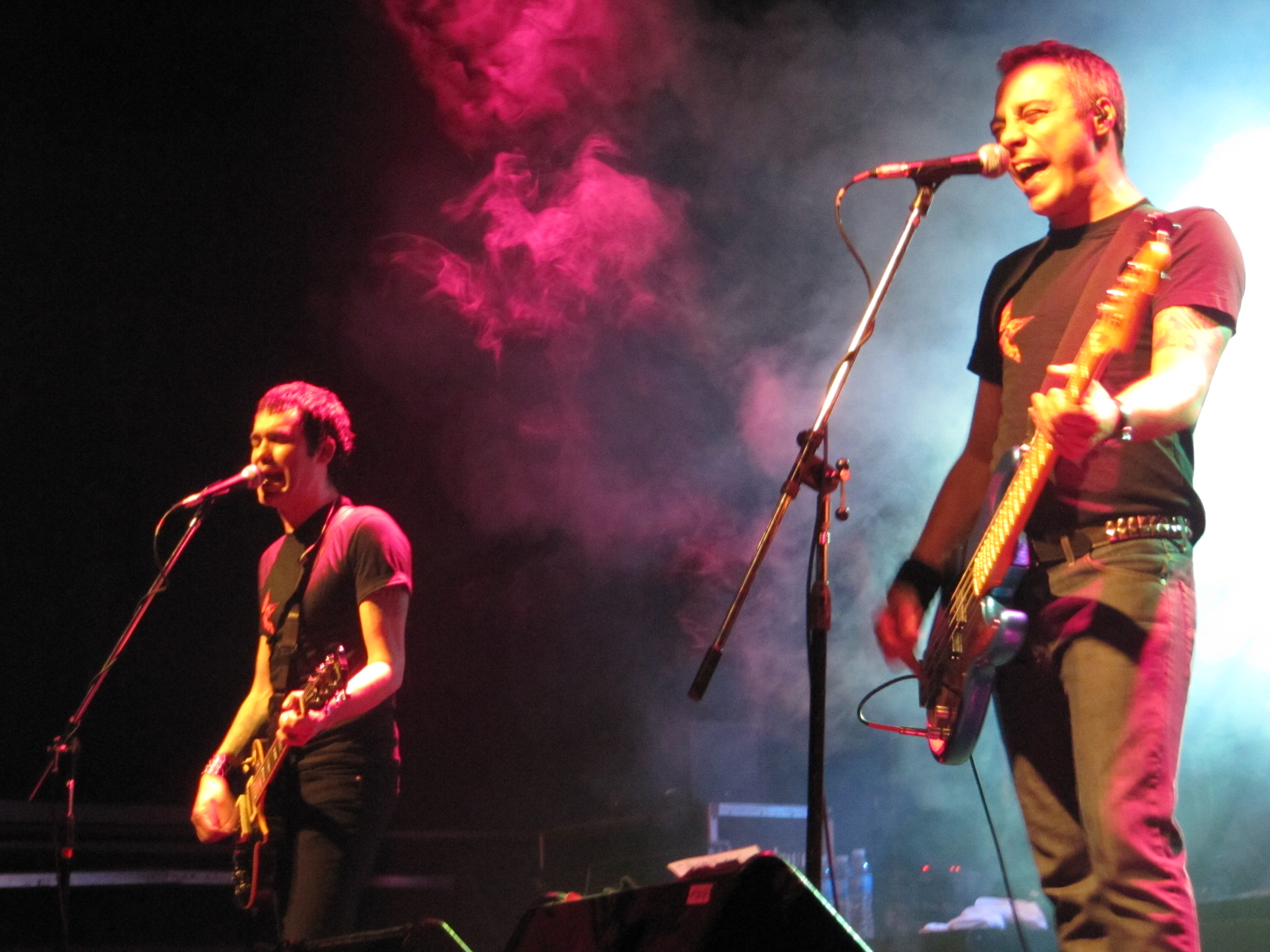 Miembros de la banda argentina Attaque 77.